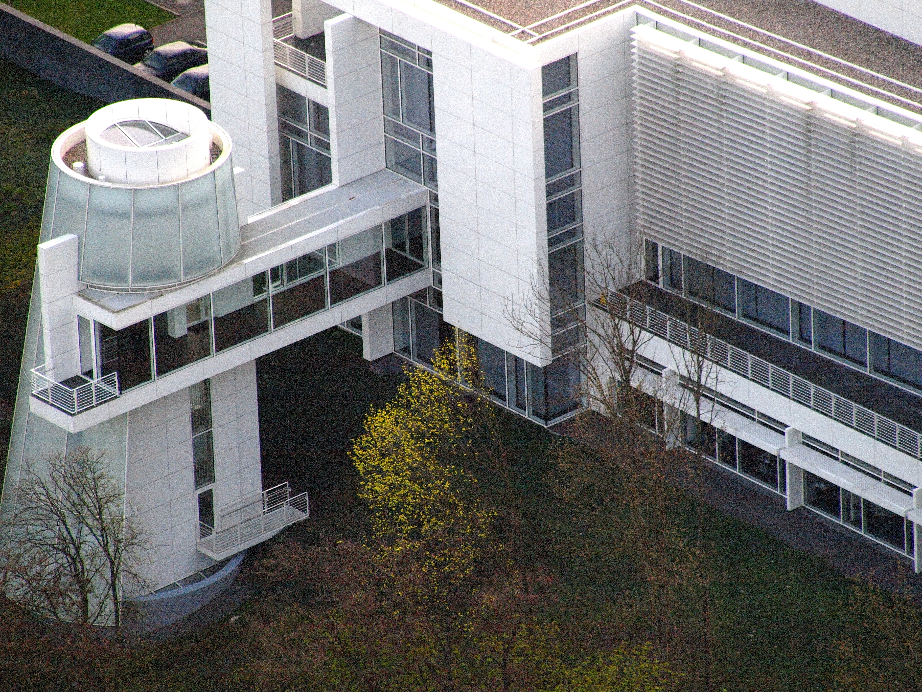 Arp Museum Bahnhof Rolandseck, architektonisches Detail